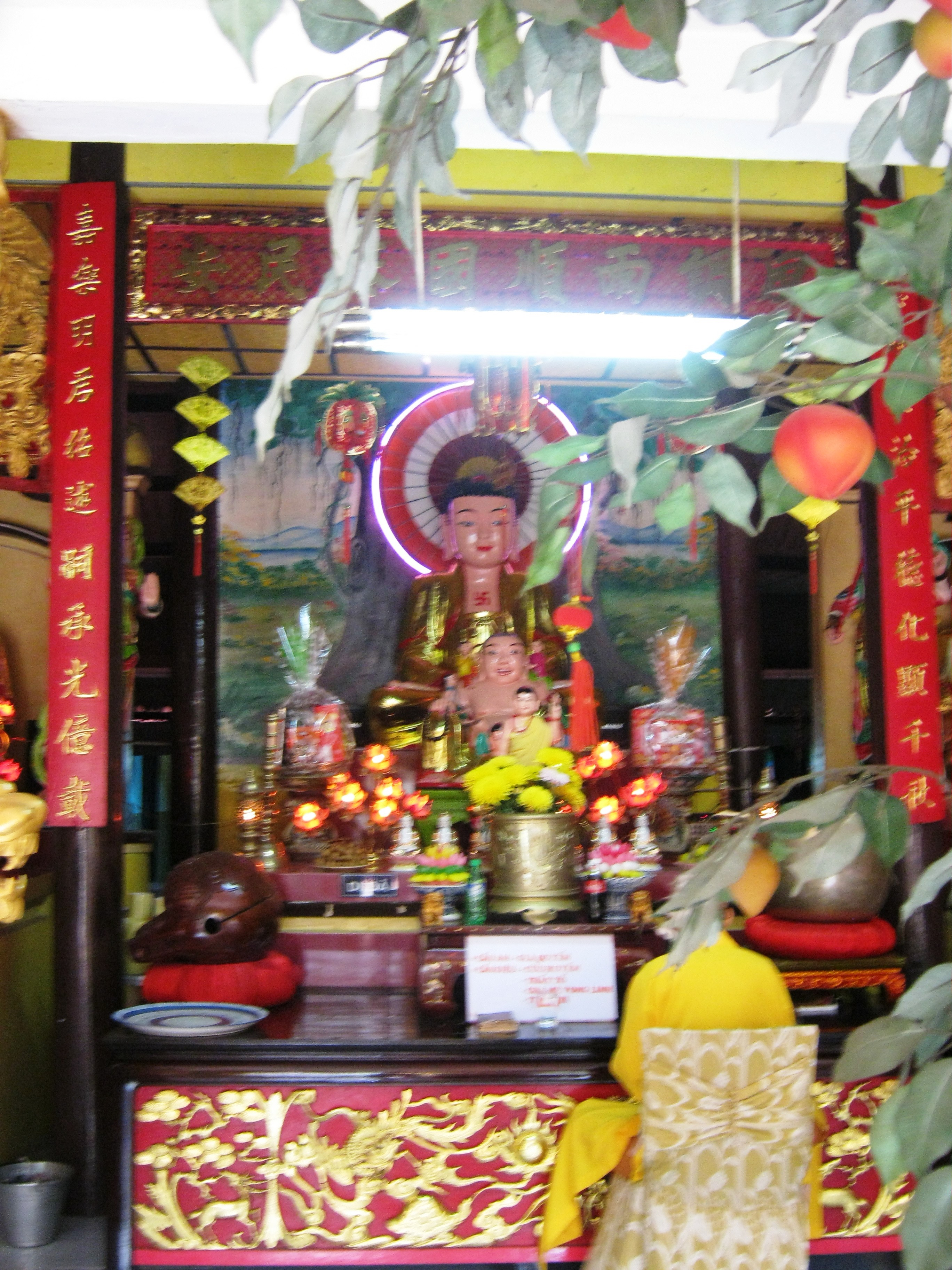 Bàn thờ Phật ở giữa chính điện chùa cổ Tập Phước tại quận Bình Thạnh, Thành phố Hồ Chí Minh, Việt Nam.